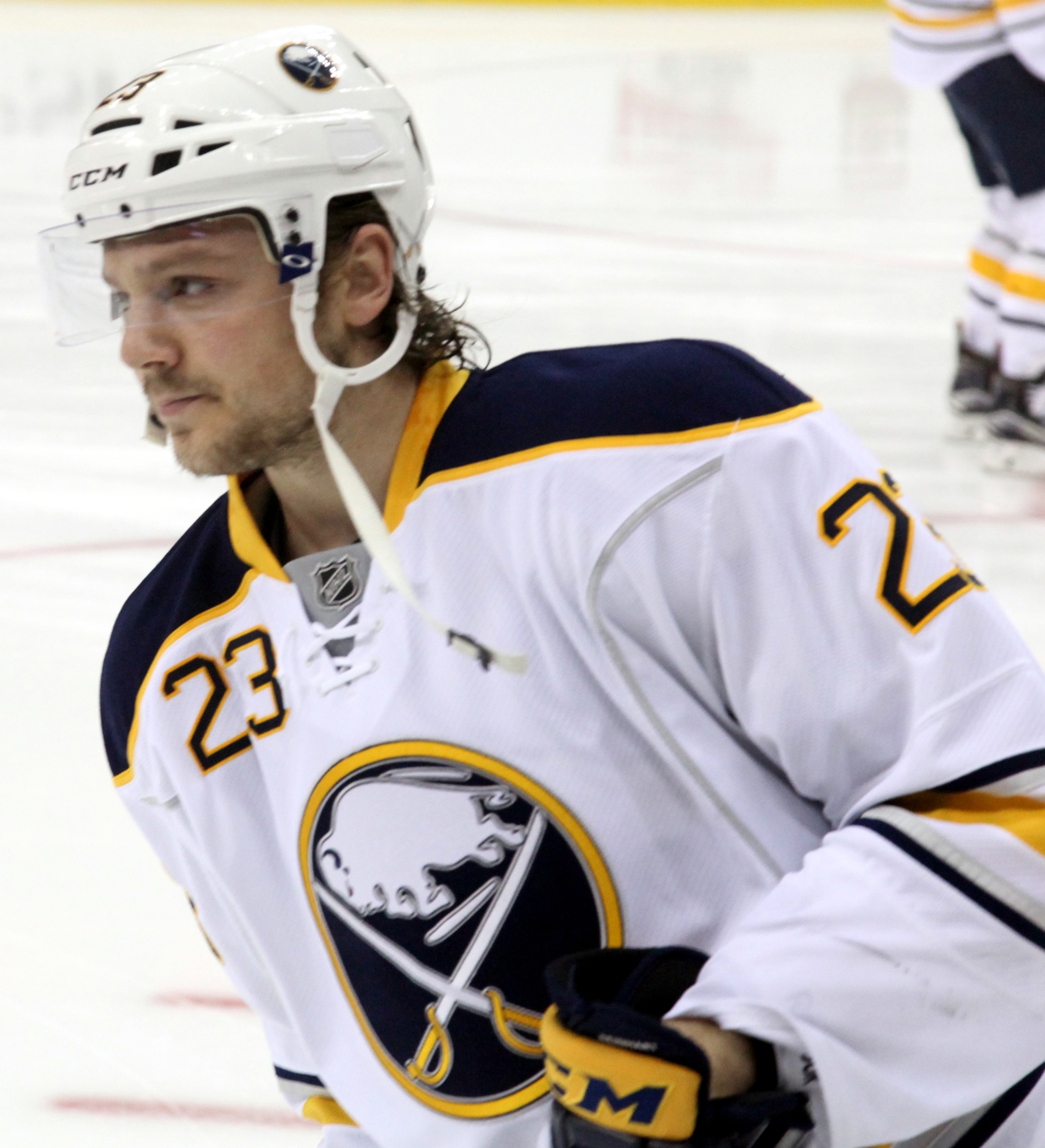 Sam Reinhart in April 2016.